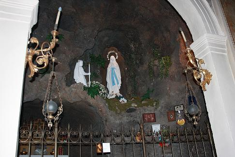 Riproduzione all'interno della chiesa di San Vito Martire a Cerea della Grotta di Lourdes